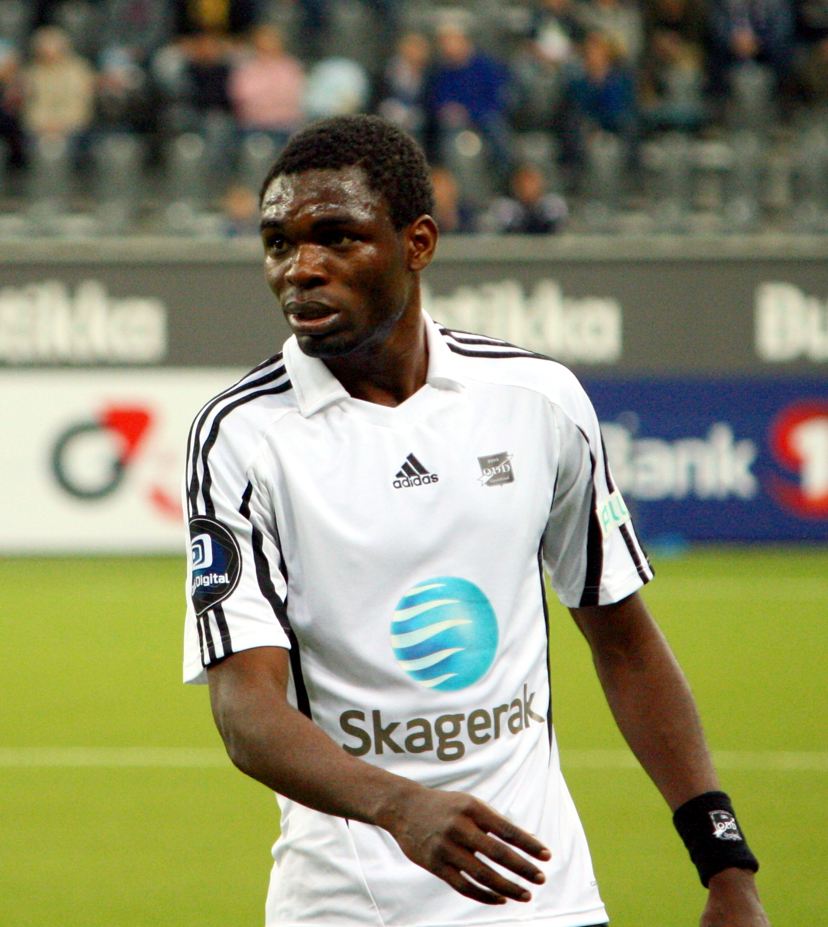 Footballer Chukwuma Akabueze.